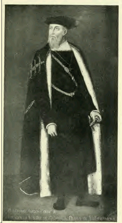 Maestre de Calatrava, conde de Ribagorza, primer duque de Vilafermosa, copia de otro más antiguo. Se conserva en el palacio ducal de Pedrola, Zaragoza, España.